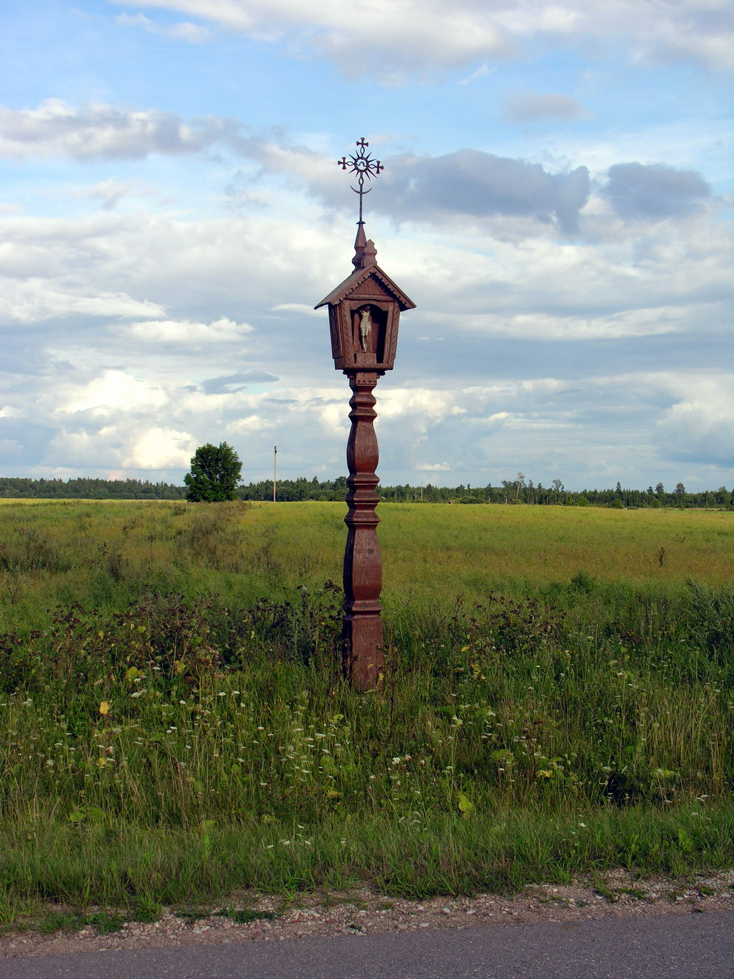 Žemaitėška: Kuoplytstolpis Puortegrapėjė Algėrda, 2005 m. rugsiejė 3 d., Žemaitėjė